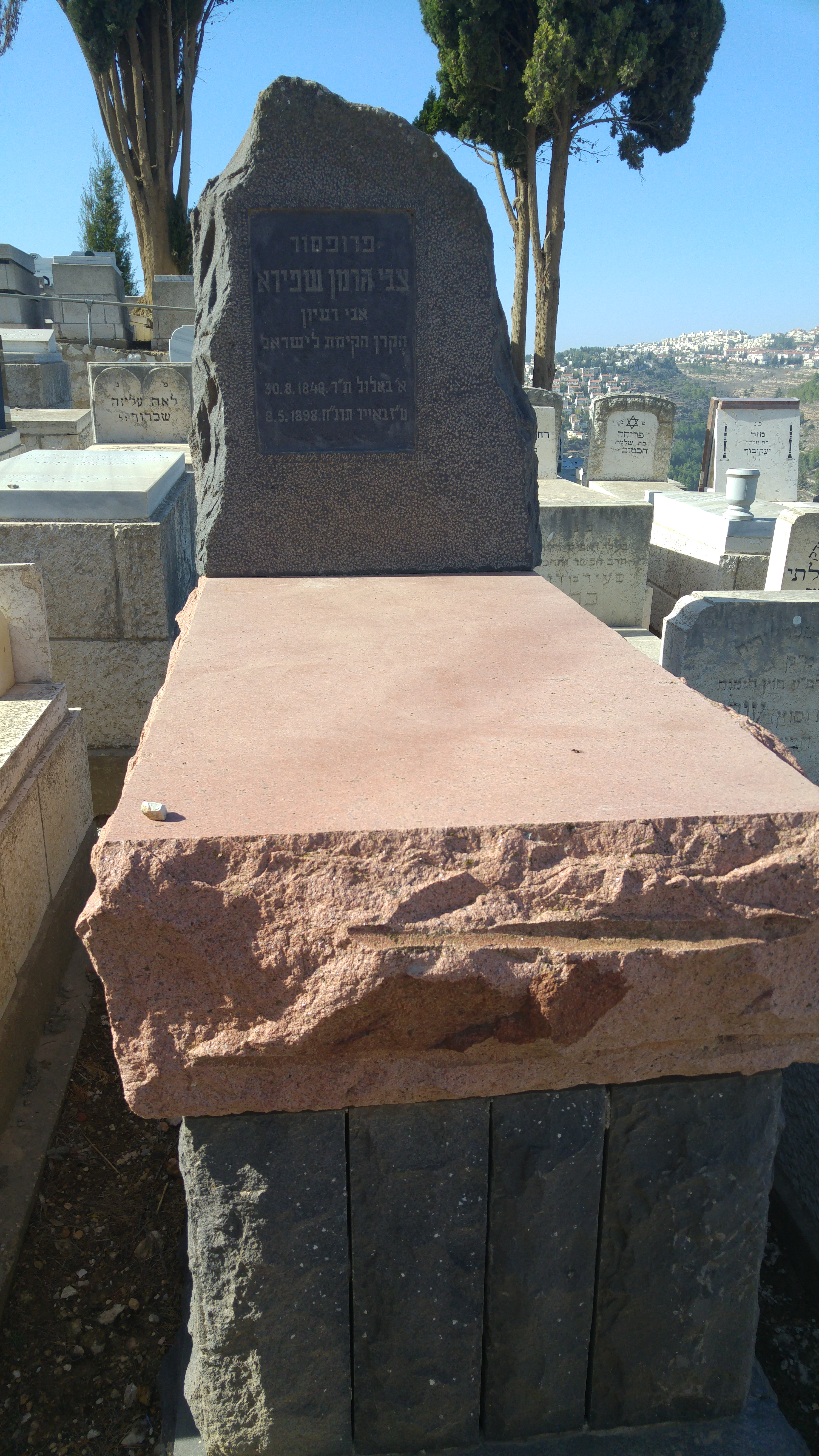 מצבתו בהר המנוחות